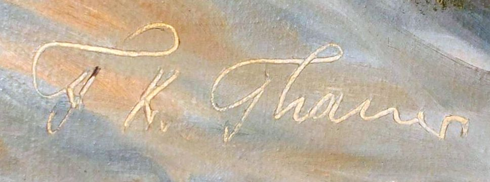 Signatur des Malers Friedrich Karl Thauer (1924–2009)